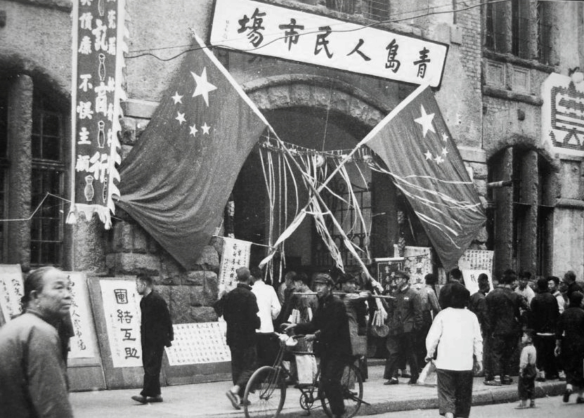 青岛人民市场正门